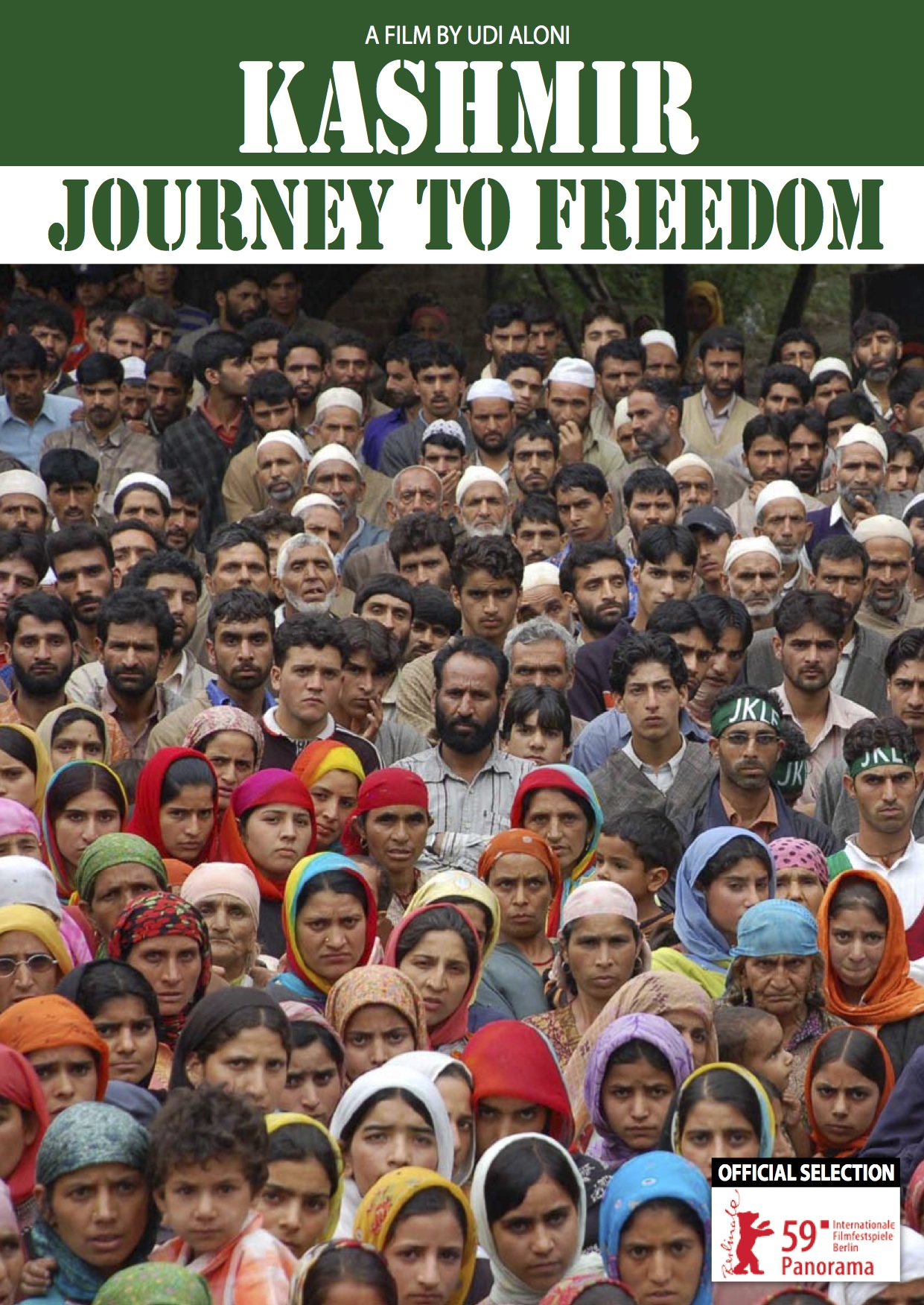 אודי אלוני הוא במאי, סופר ואמן חזותי ופעיל שמאל רדיקלי ישראלי., בנה של שולמית אלוני פוסטר הסרט קשמיר הדרך לחופש